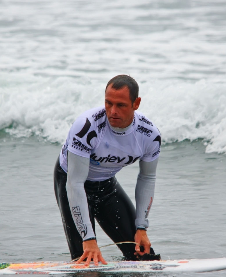 Hurley Pro 2010 - Heat #10 Men's Round 2